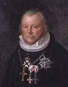 Frederik Julius Bech, norwegian bishop (died 1822)